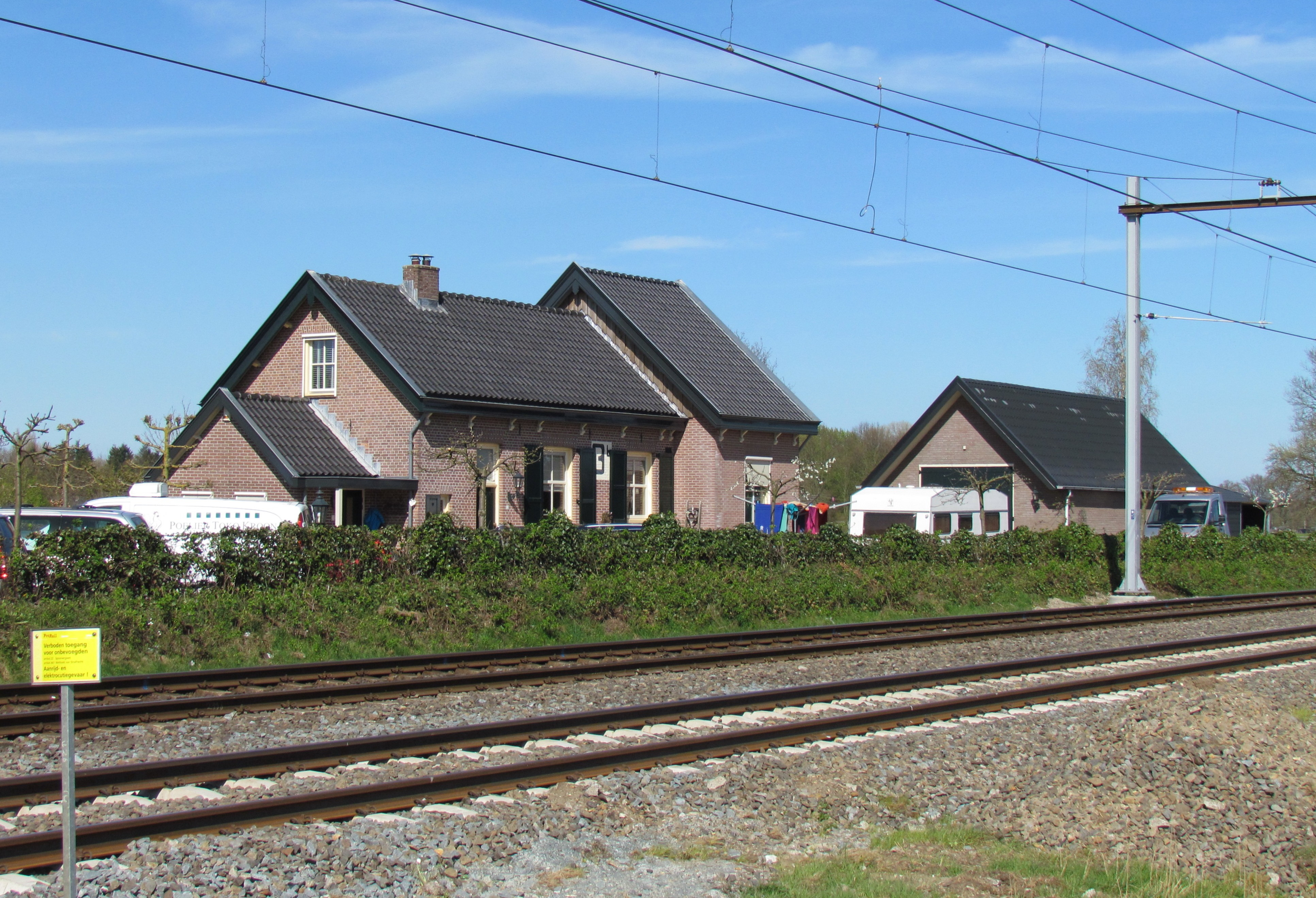 Baanwachtershuis van het voormalige treinstation Teuge tussen Deventer en Apeldoorn. Stond jarenlang leeg, maar werd rond de millenniumwisseling opgeknapt en is sindsdien weer bewoond